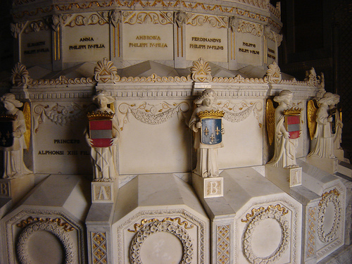 Pantheon of the Infantes - Chapel 6. Mausoleo poligonal en la sexta cámara del Panteón de Infantes